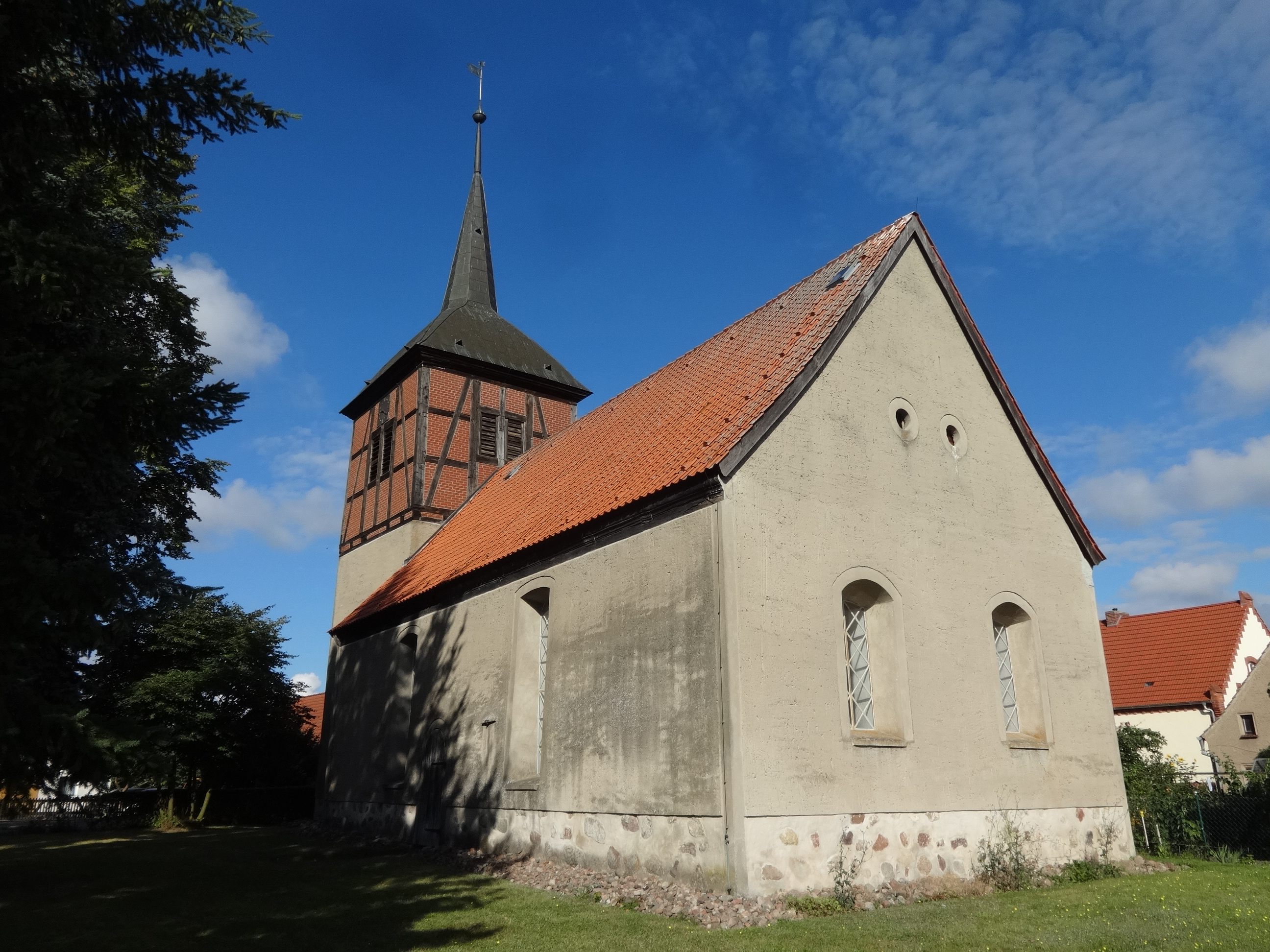 Die Dorfkirche in Jatznick ist eine Feldsteinkirche, die vermutlich im 14. Jahrhundert entstand und um 18. Jahrhundert barock überformt wurde. Im Innern befindet sich eine barocke Ausstattung, die überwiegend aus dem Jahr 1733 stammt.